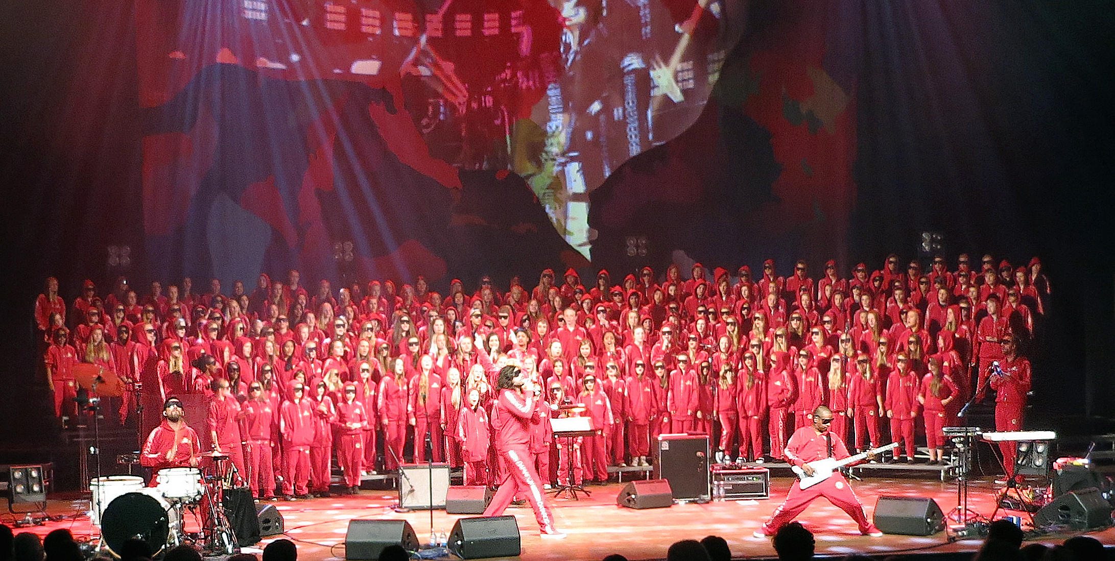 Datarock